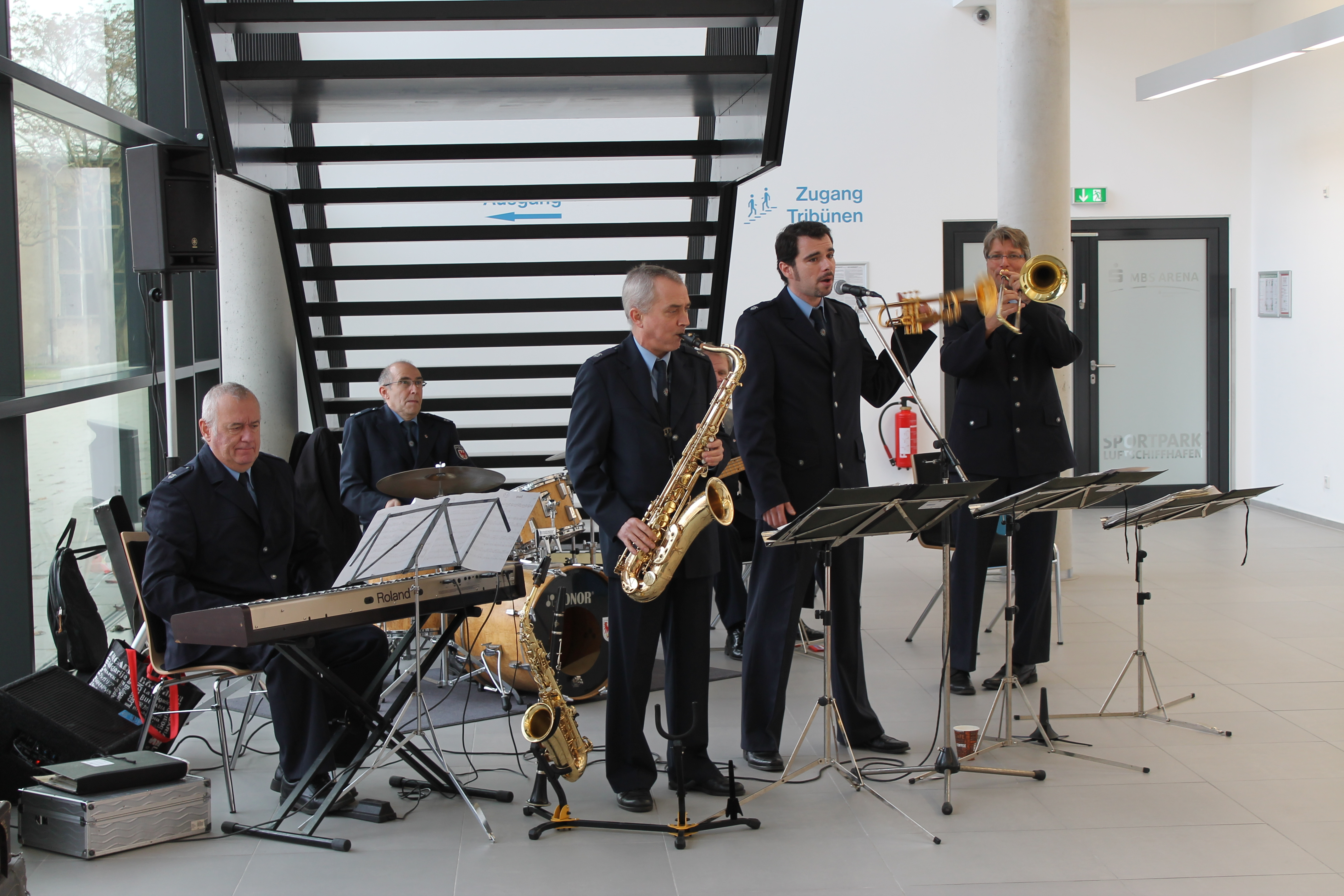 Die Combo des Landespolizeiorchesters Brandenburg im November 2013 in der MBS-Arena in Potsdam.